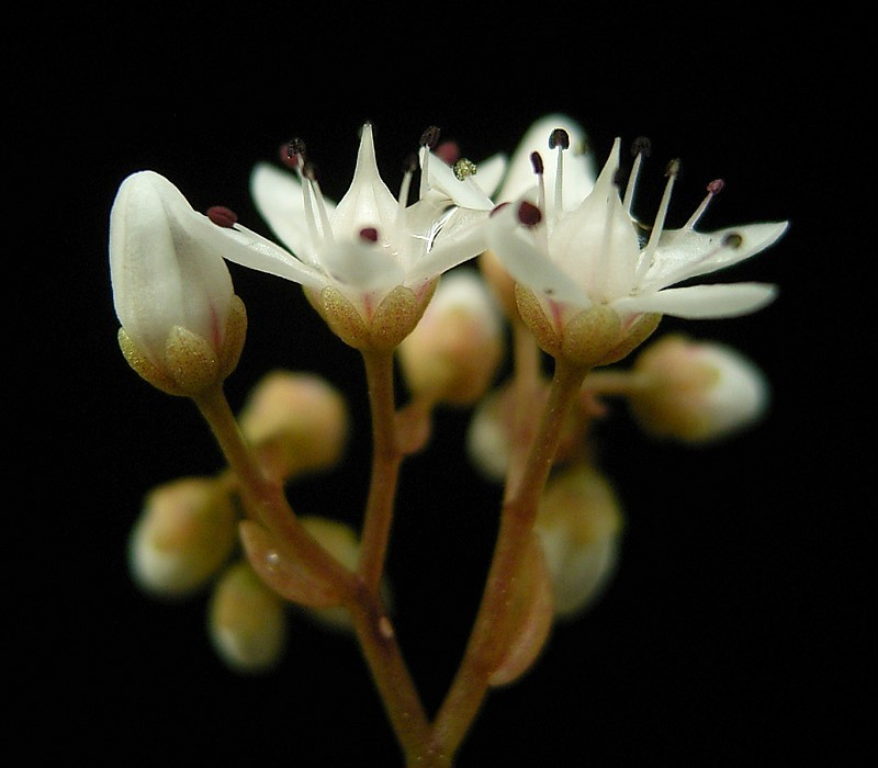 Sedum album